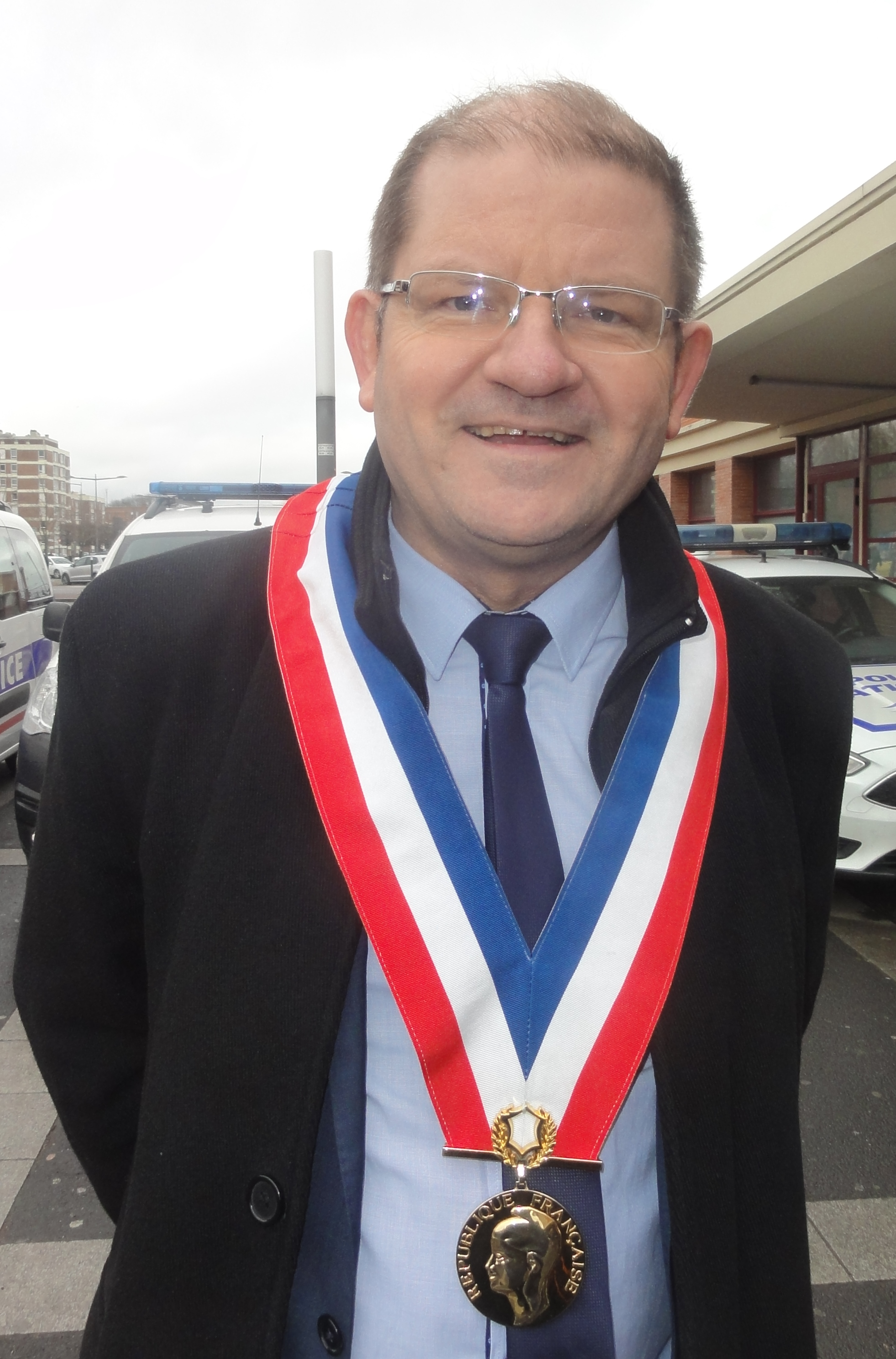 Manifestation contre la suppression des dessertes TGV en gare de Douai le 2 mars 2019. Depicted place: Douai railway station Depicted person: Jean-Michel Szatny – French politician